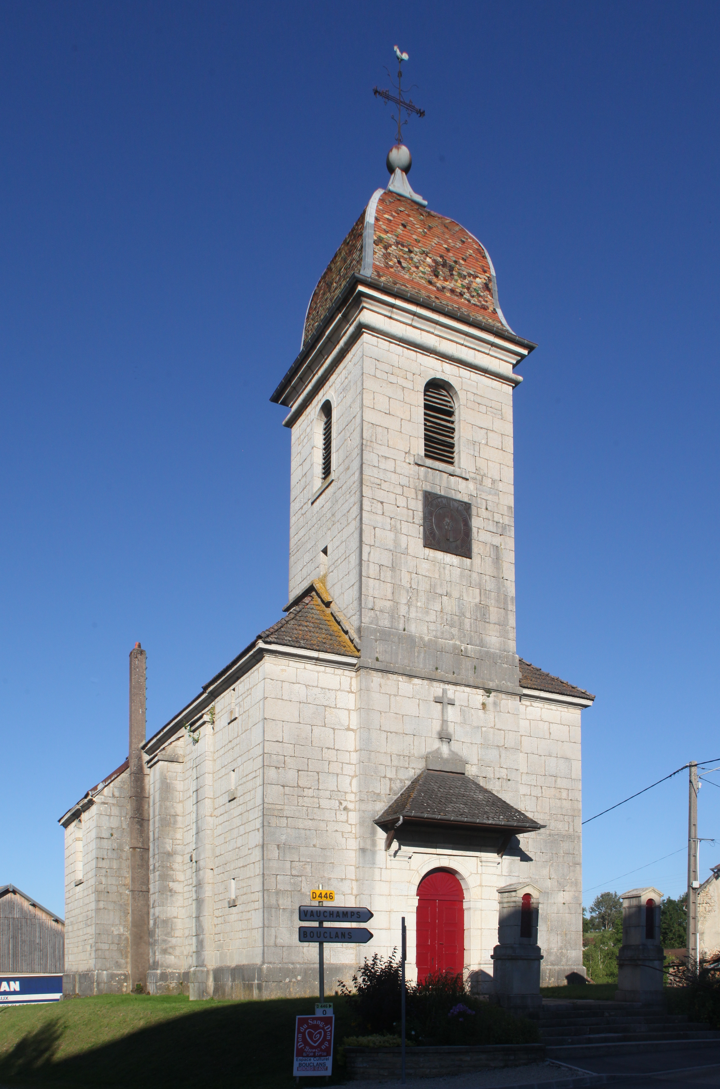 Église d'Osse (Doubs).